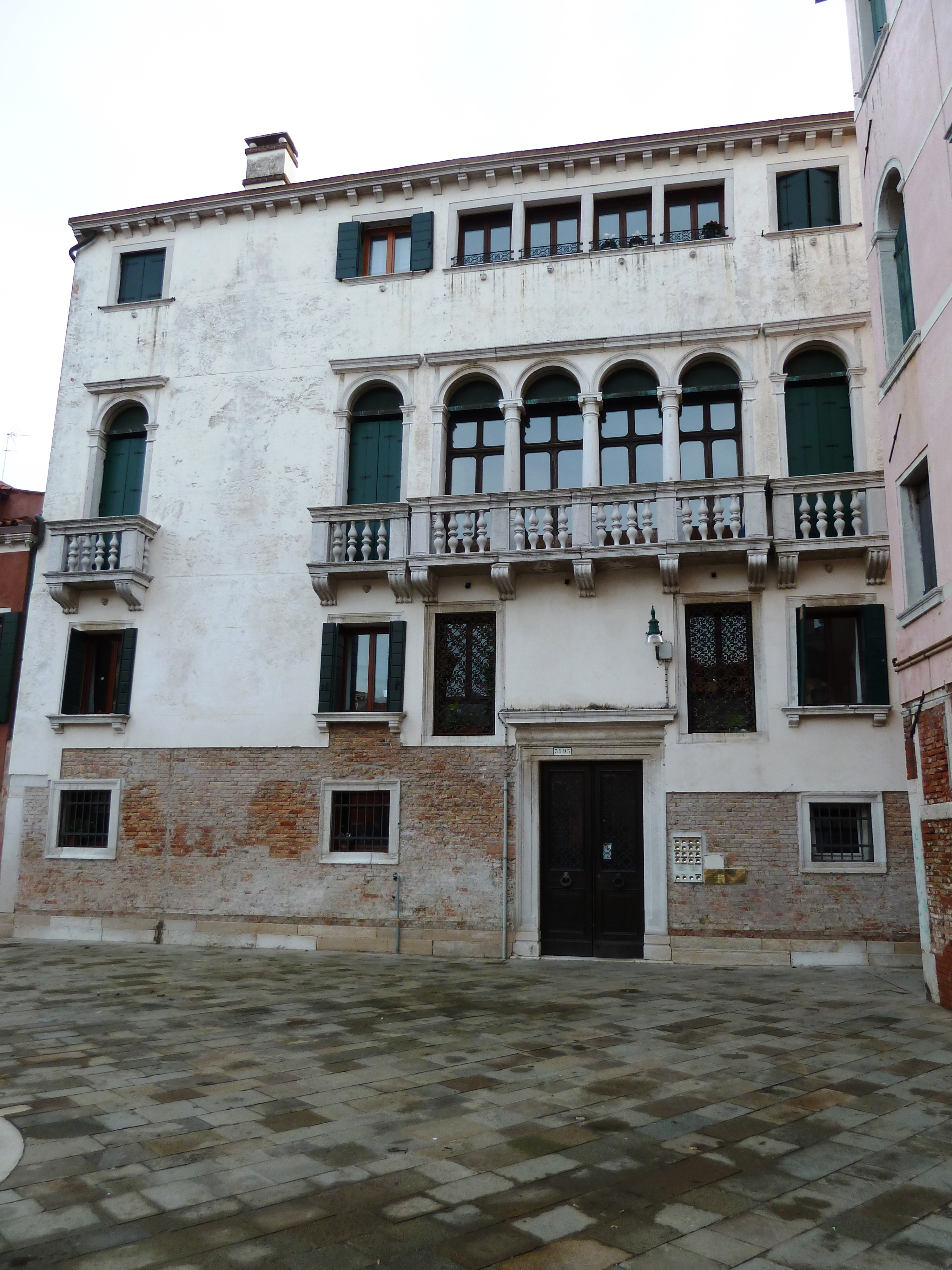 Palazzo Gabrielli Dolfin (Venice)